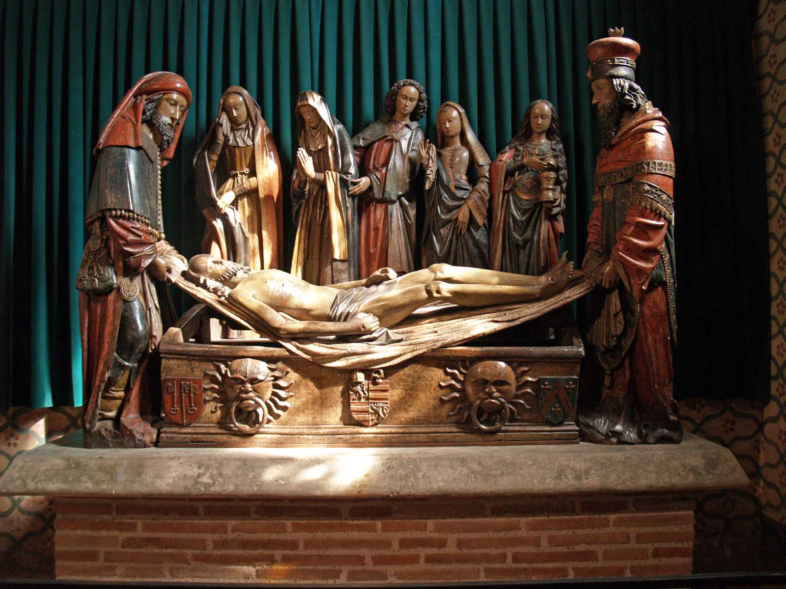 Abbaye Saint Pierre de Moissac La mise au tombeau Oeuvre exécutée entre 1449 et 1503 par Pierre de Carmaing, abbé, ou Antoine de Carmaing, abbé (sculpteur) Photo personnelle Bertrand Bouret